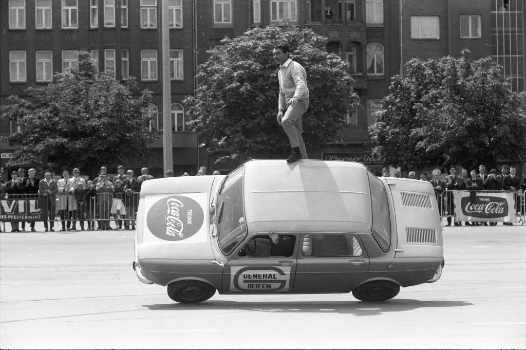 Autoakrobat Schräger Jo (Jose Canga) auf dem Exerzierplatz